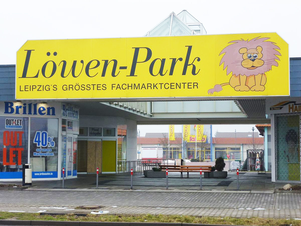 Löwenpark in Rückmarsdorf